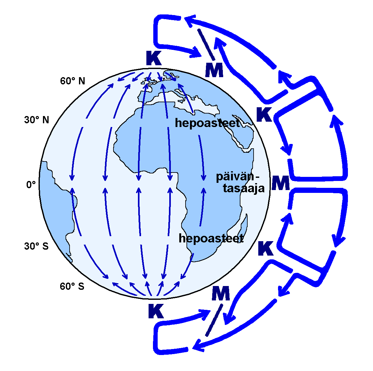 Description